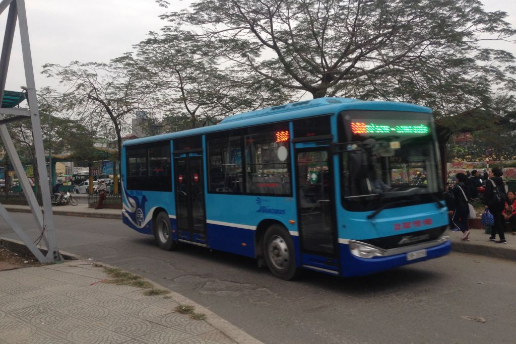 Hanoibus 10A (Long Biên - Từ Sơn) nay dùng xe BC095